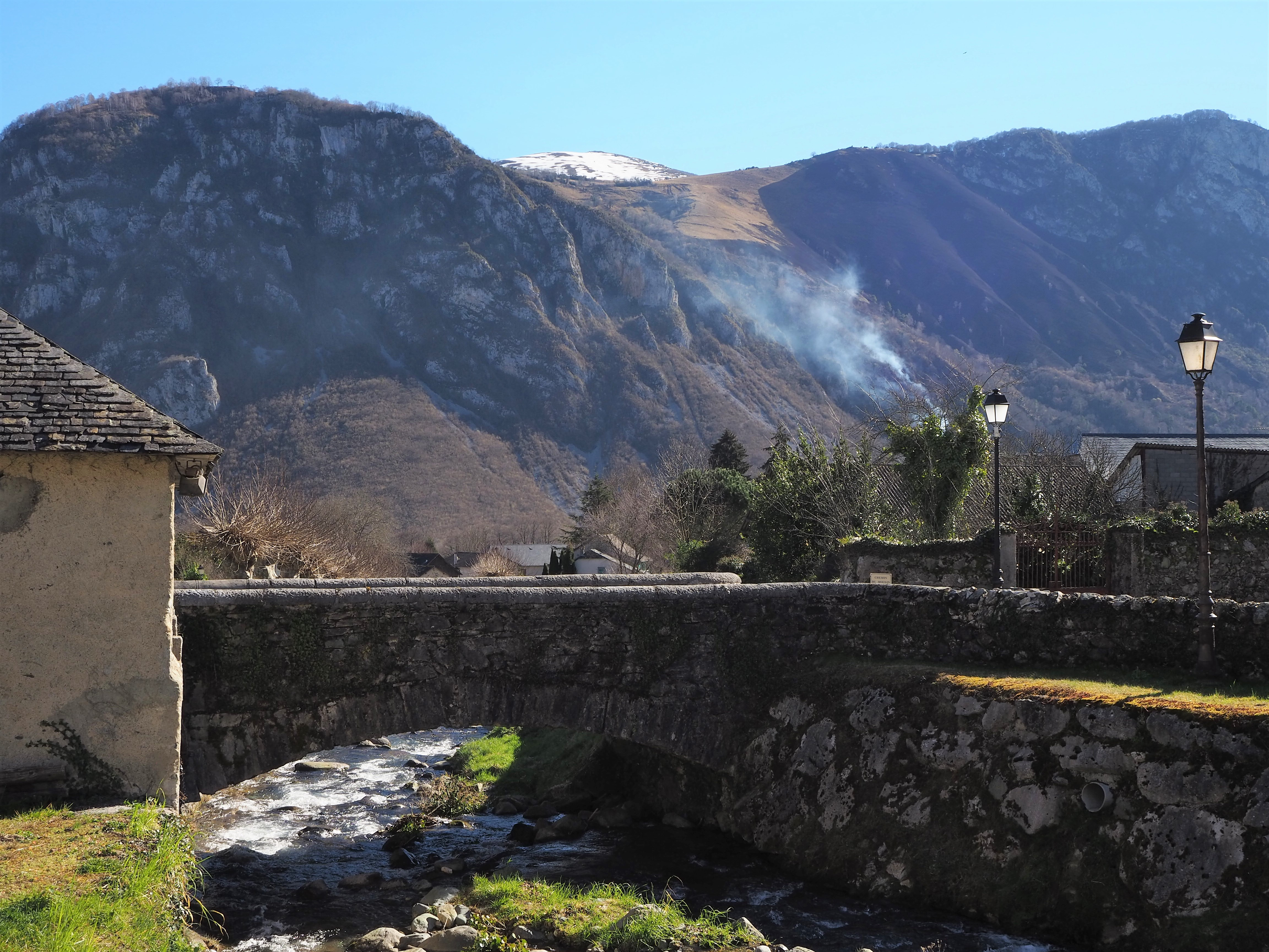 Village de Bielle.